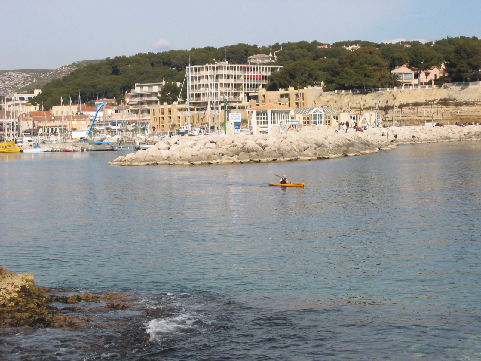 Le port de Carry-le-Rouet, Bouches-du-Rhône, France